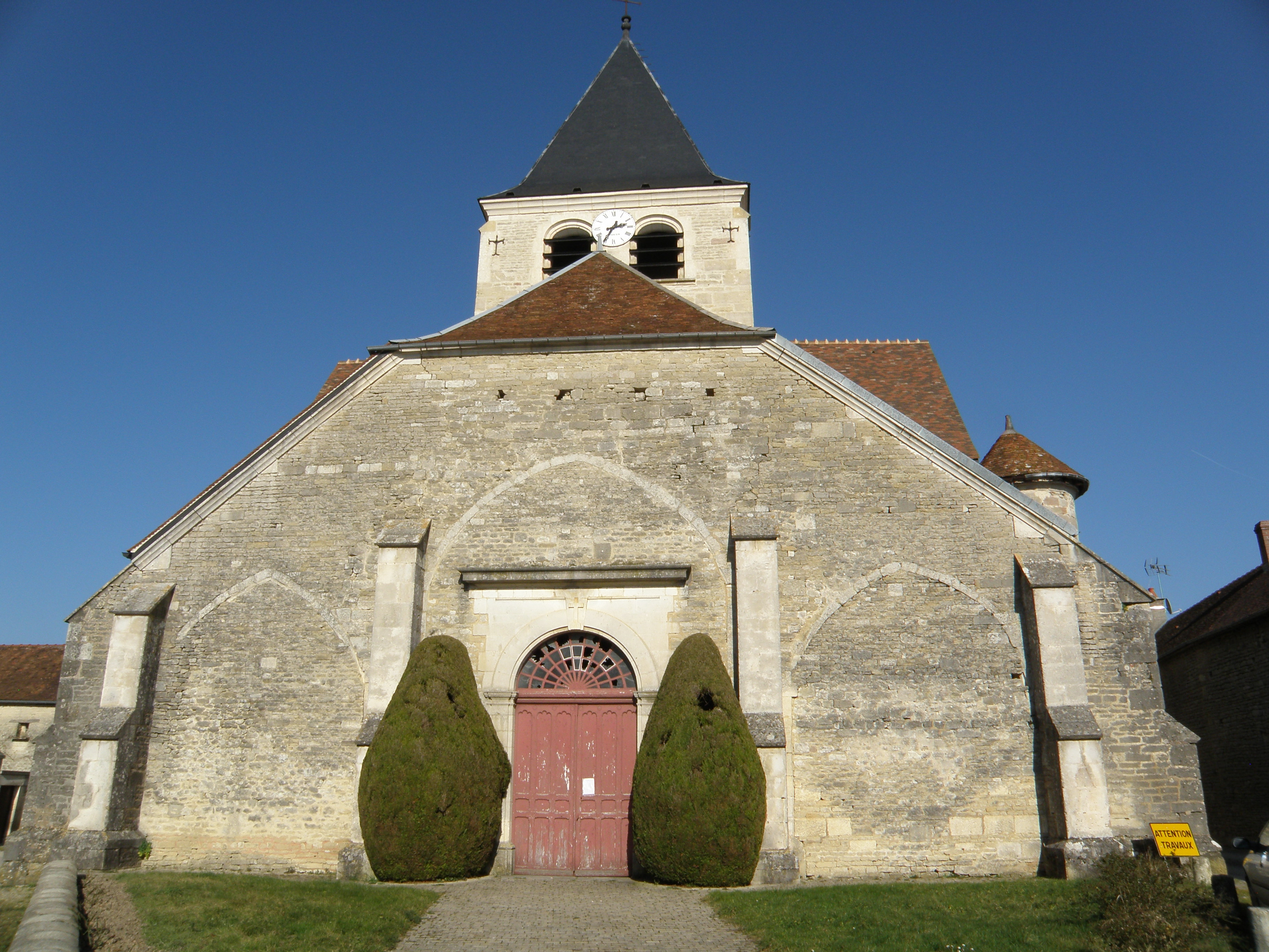 Eglise Saint-Phal. 10340 Avirey-Lingey